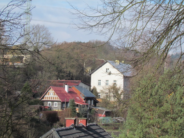 Pohled přes rokli v Soběslavicích na budovu bývalé školy a zachovalou chalupou (Kavanovi)